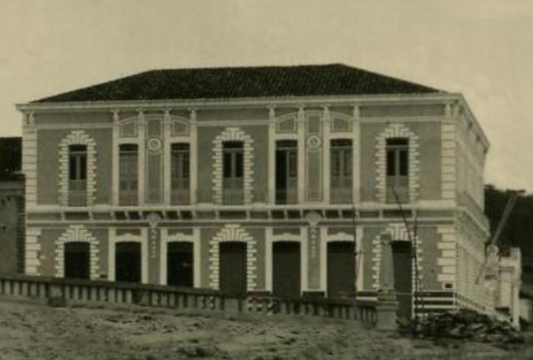 Edifício-Sede de Grillo Lamberti & Cia, conhecido popularmente como Sobrado dos Grillos - Jequié